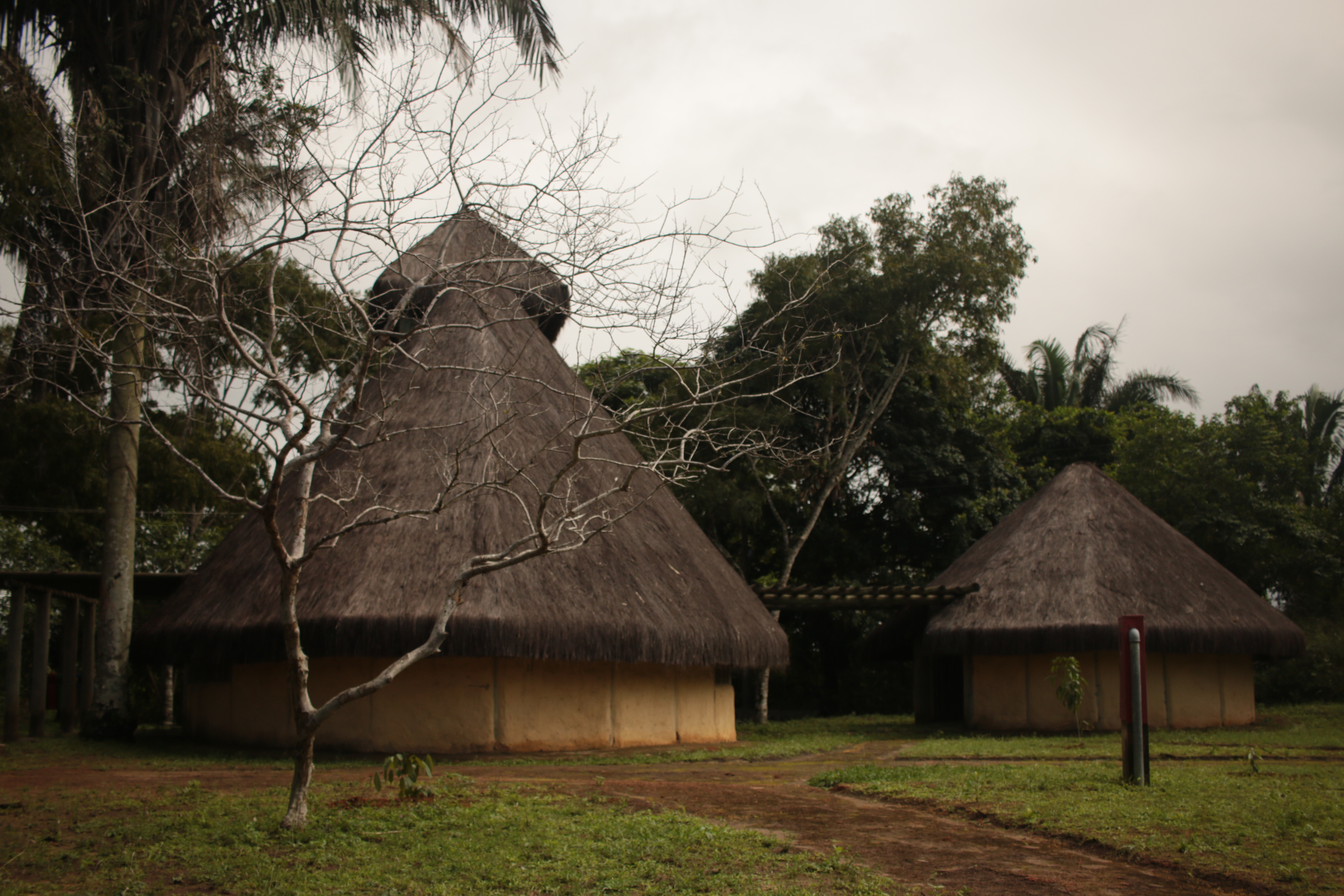 réplica da sede administrativa do Quilombo dos palmares. Estima-se que no seu auge, 1/4 da população brasileira morava no quilombo